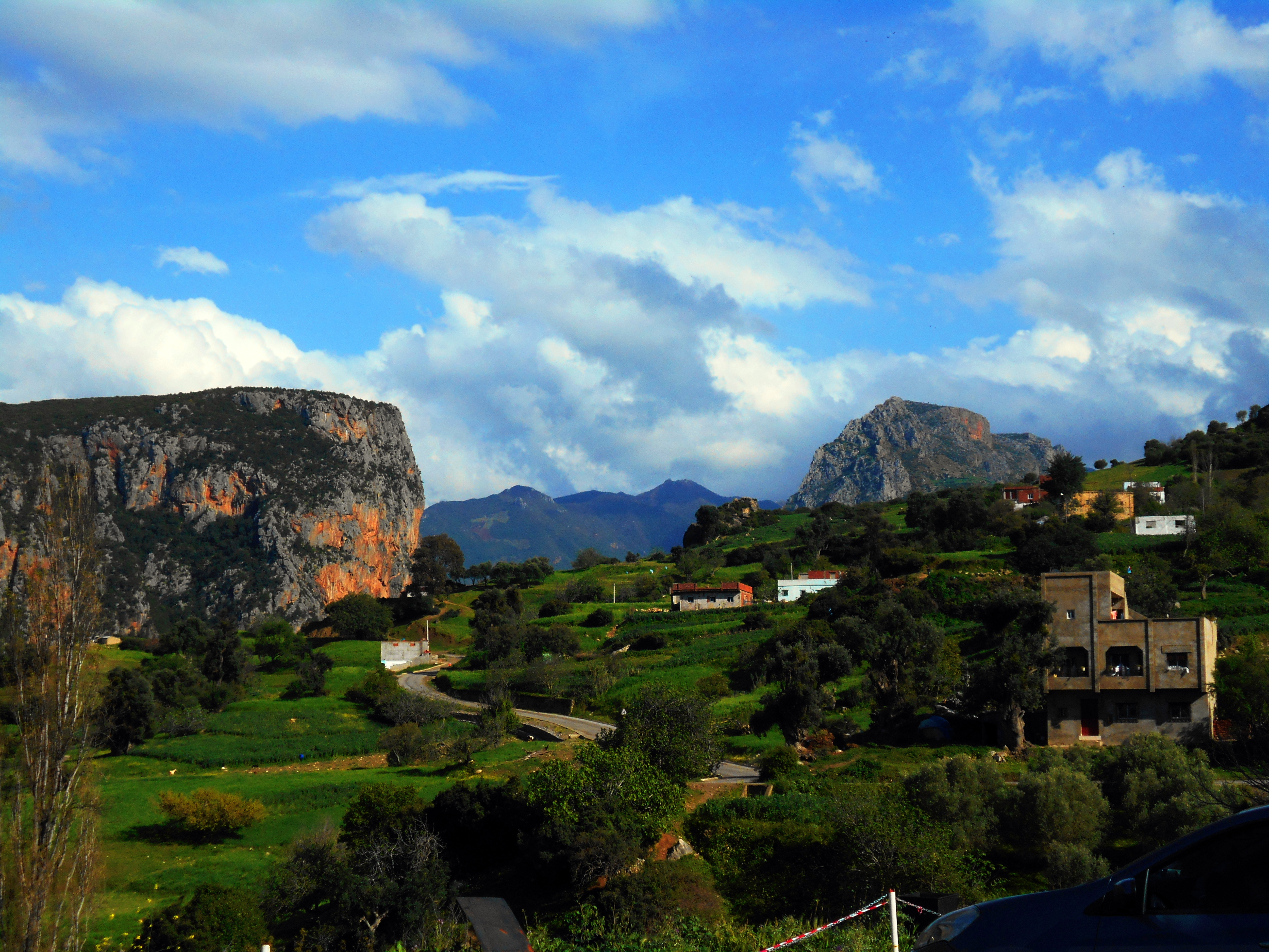 Akchour, 30 km de Chefchaouen, nord du Maroc